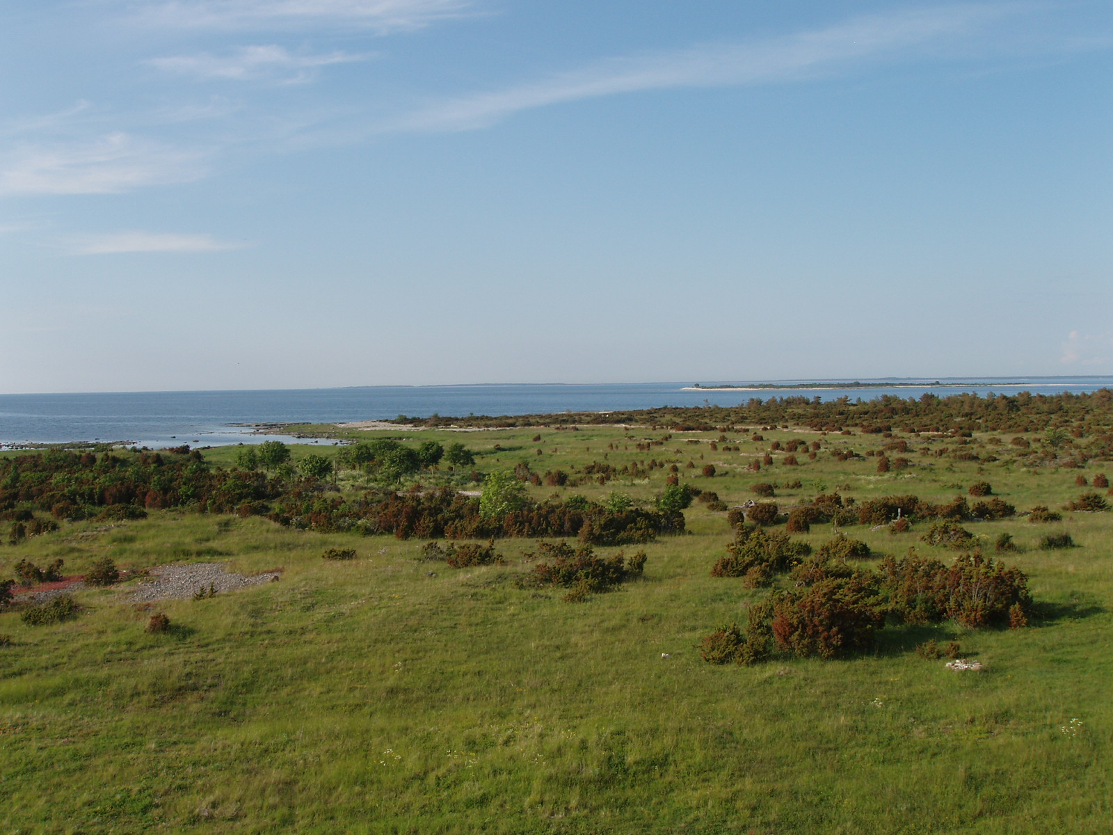 Vilsandi rannik majaka juures